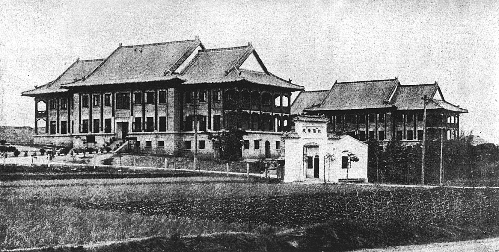 位於廣州的執信學校，現廣州市執信中學。